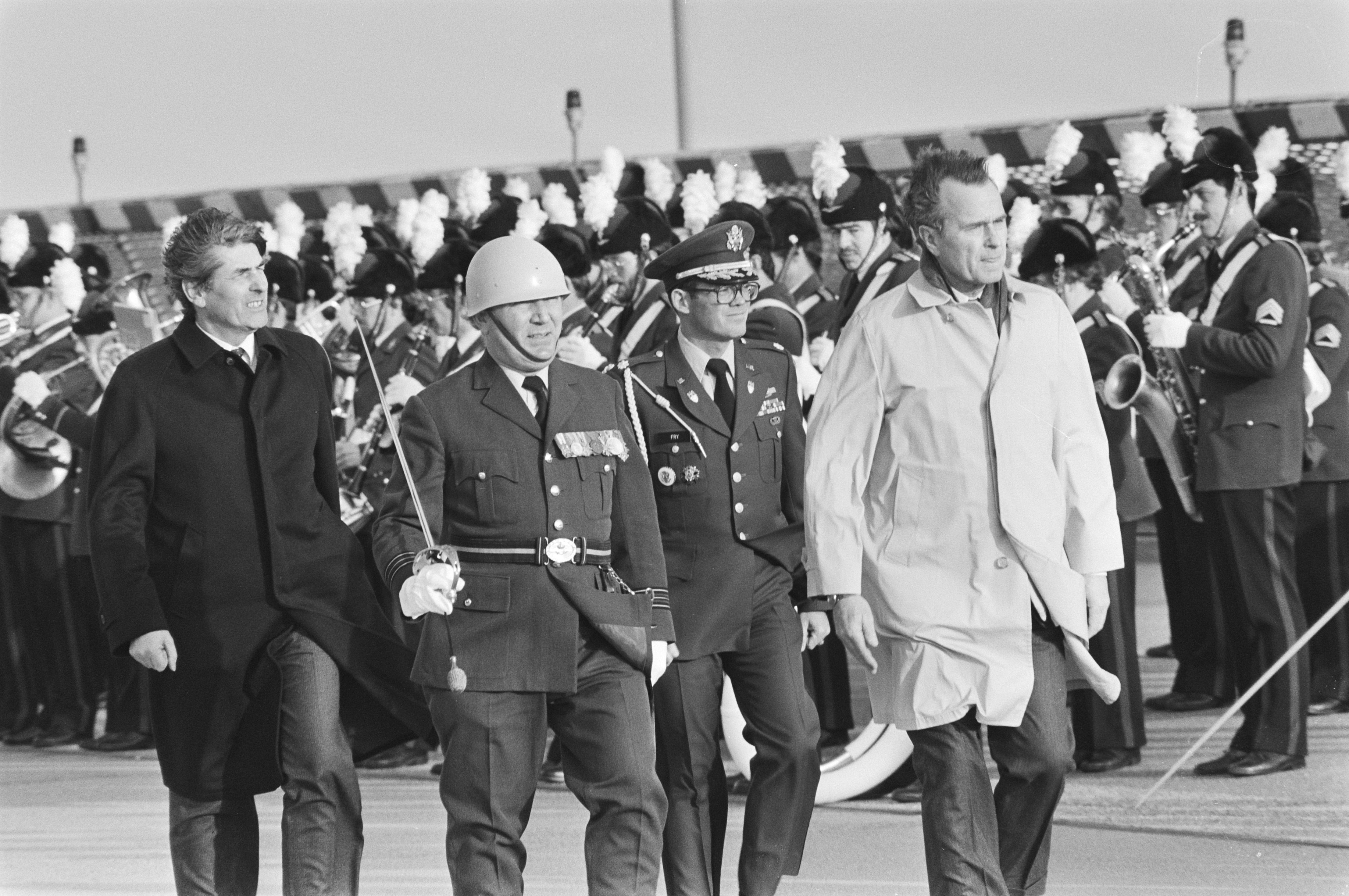 Collectie / Archief : Fotocollectie Anefo Reportage / Serie : Bezoek van de Amerikaanse vice-president George Bush Beschrijving : George Bush (sr.) en premier Lubbers inspecteren de erewacht bij de aankomst op Schiphol Datum : 1 februari 1983 Locatie : Noord-Holland, Schiphol Trefwoorden : aankomst en vertrek, militairen, ministers-presidenten, plechtigheden, staatsbezoeken Persoonsnaam : Bush, George, Lubbers, Ruud Fotograaf : Croes, Rob C. / Anefo Auteursrechthebbende : Nationaal Archief Materiaalsoort : Negatief (zwart/wit) Nummer archiefinventaris : bekijk toegang 2.24.01.05 Bestanddeelnummer : 932-4870